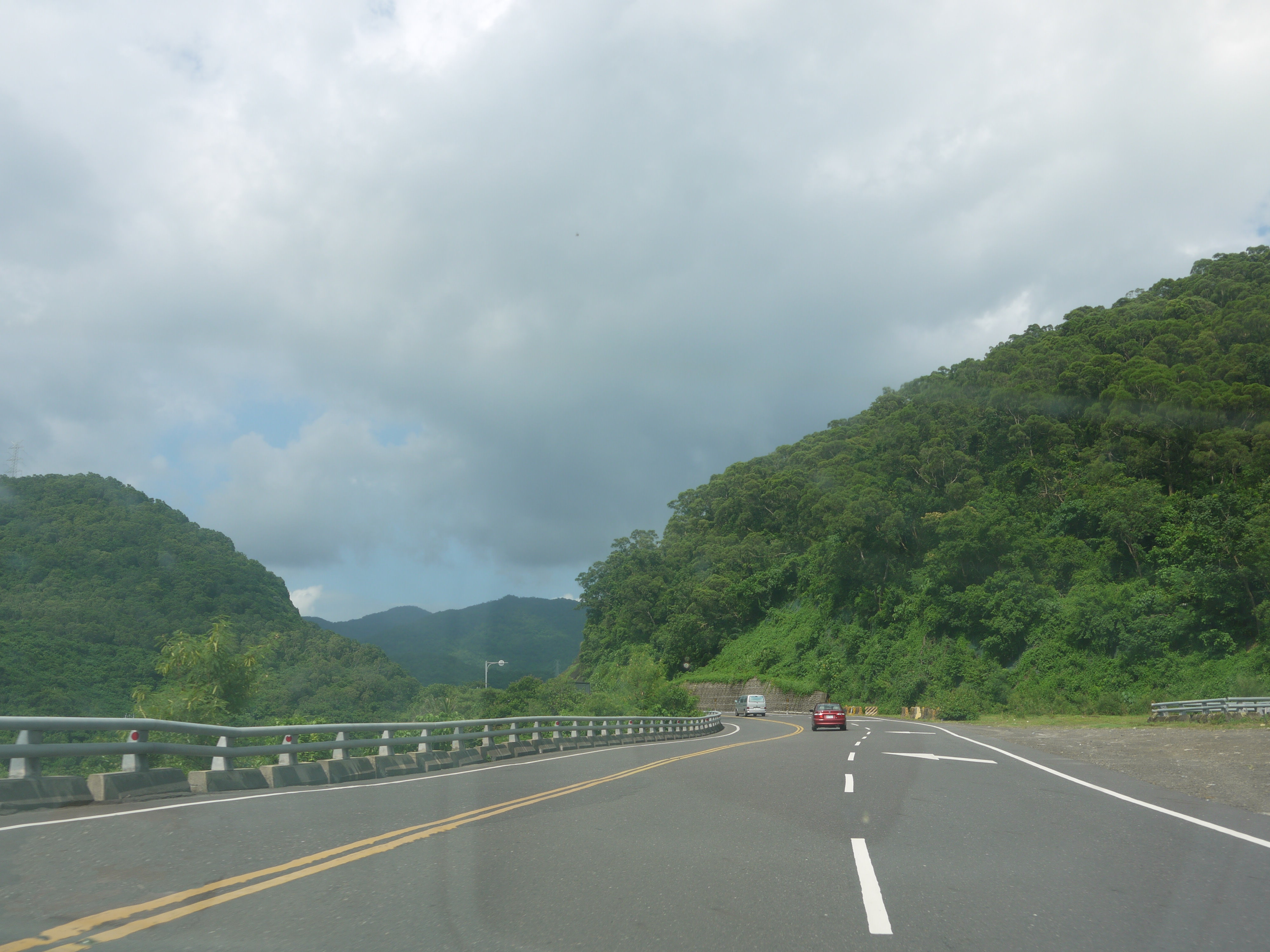 屏東縣獅子鄉 台9線 南迴公路